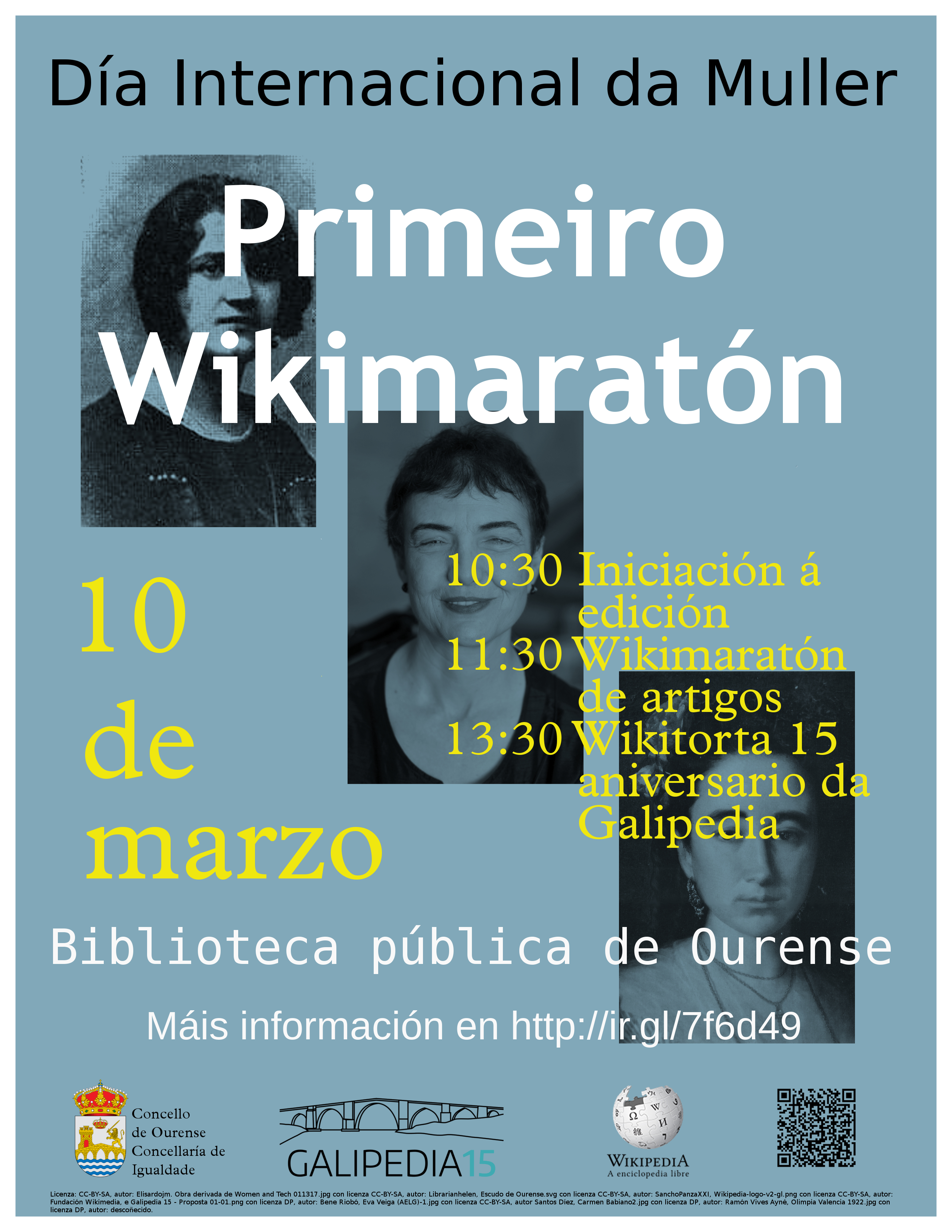 Póster para o Wikimaratón do Día Internacional da Muller do ano 2018 en Ourense.